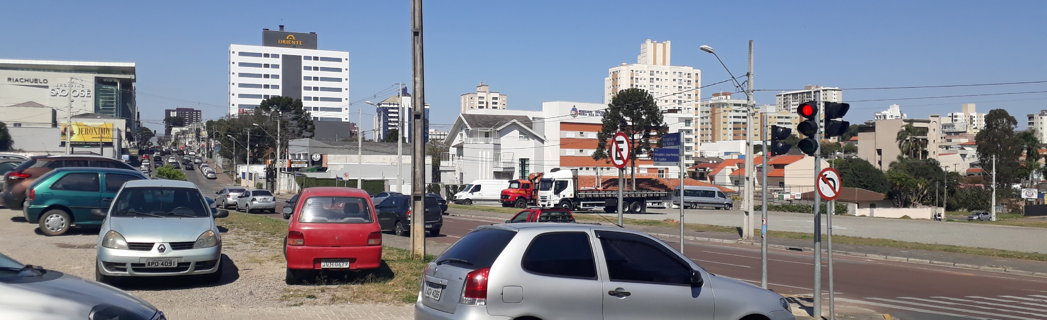 Vista do centro de São José dos Pinhais